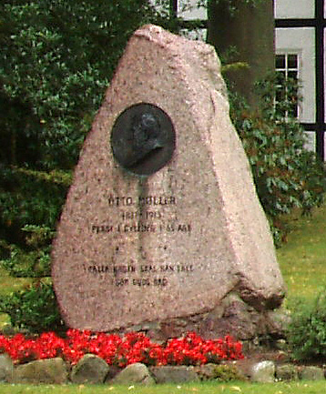 Mindesten for præsten Otto Møller ved Gylling Præstegaard, Gylling, Jutland, Denmark